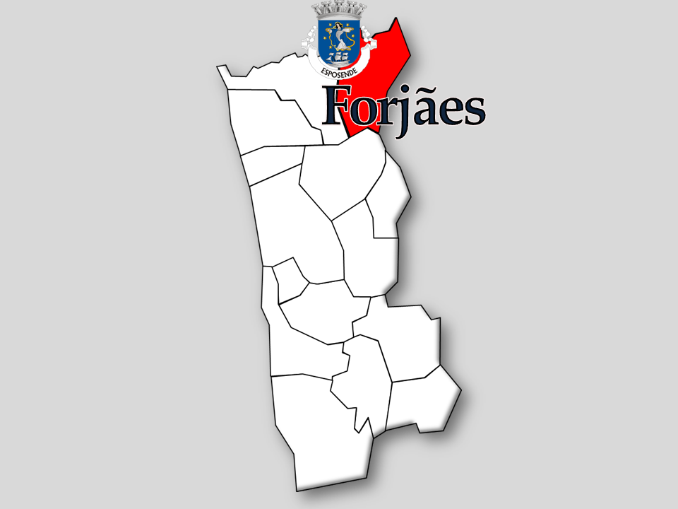 Censos 1864/2011